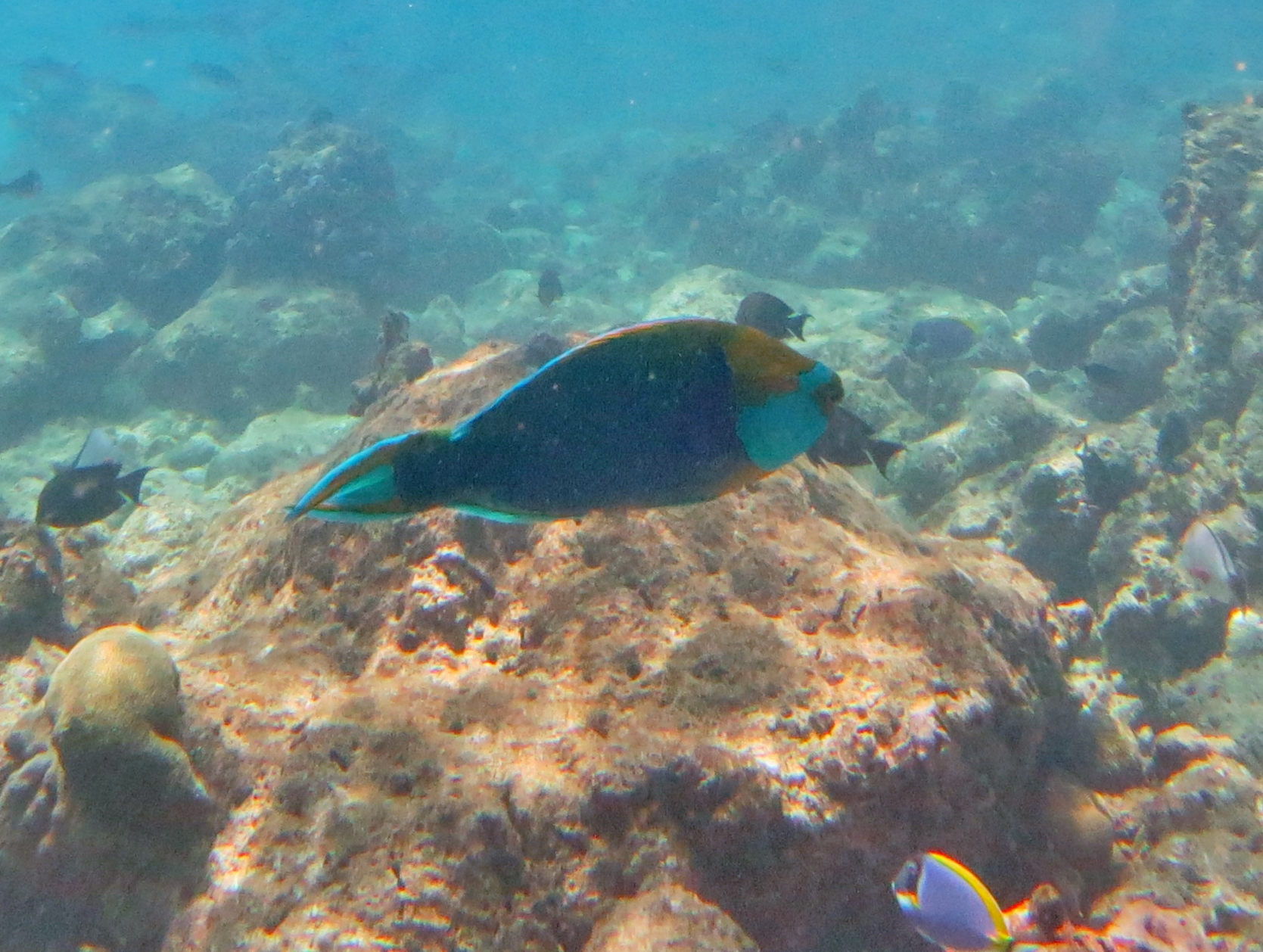 Un poisson-perroquet à gorge verte (Scarus prasiognathos) aux Maldives (Landaagiraavaru, atoll de Baa).